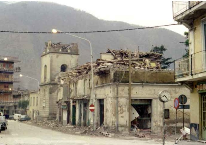 Torre Civica, crollata col terremoto del 1980 e parte del monastero Sant'Agostino, in Piazza Umberto I